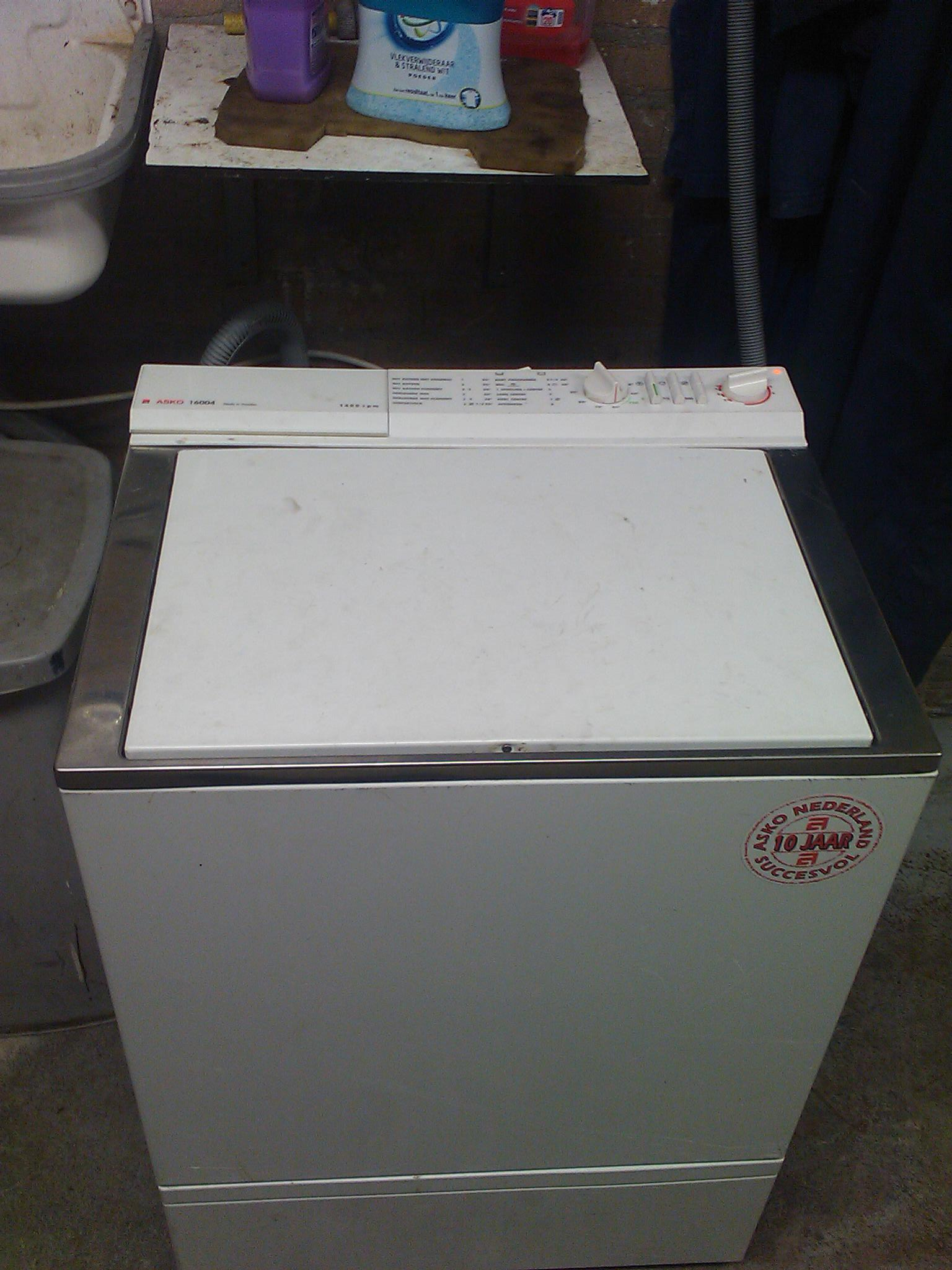 Een Asko 16004 bovenlader wasmachine uit 1995, mijn eerste. Sticker klopt niet, Asko was al veel eerder in NL.